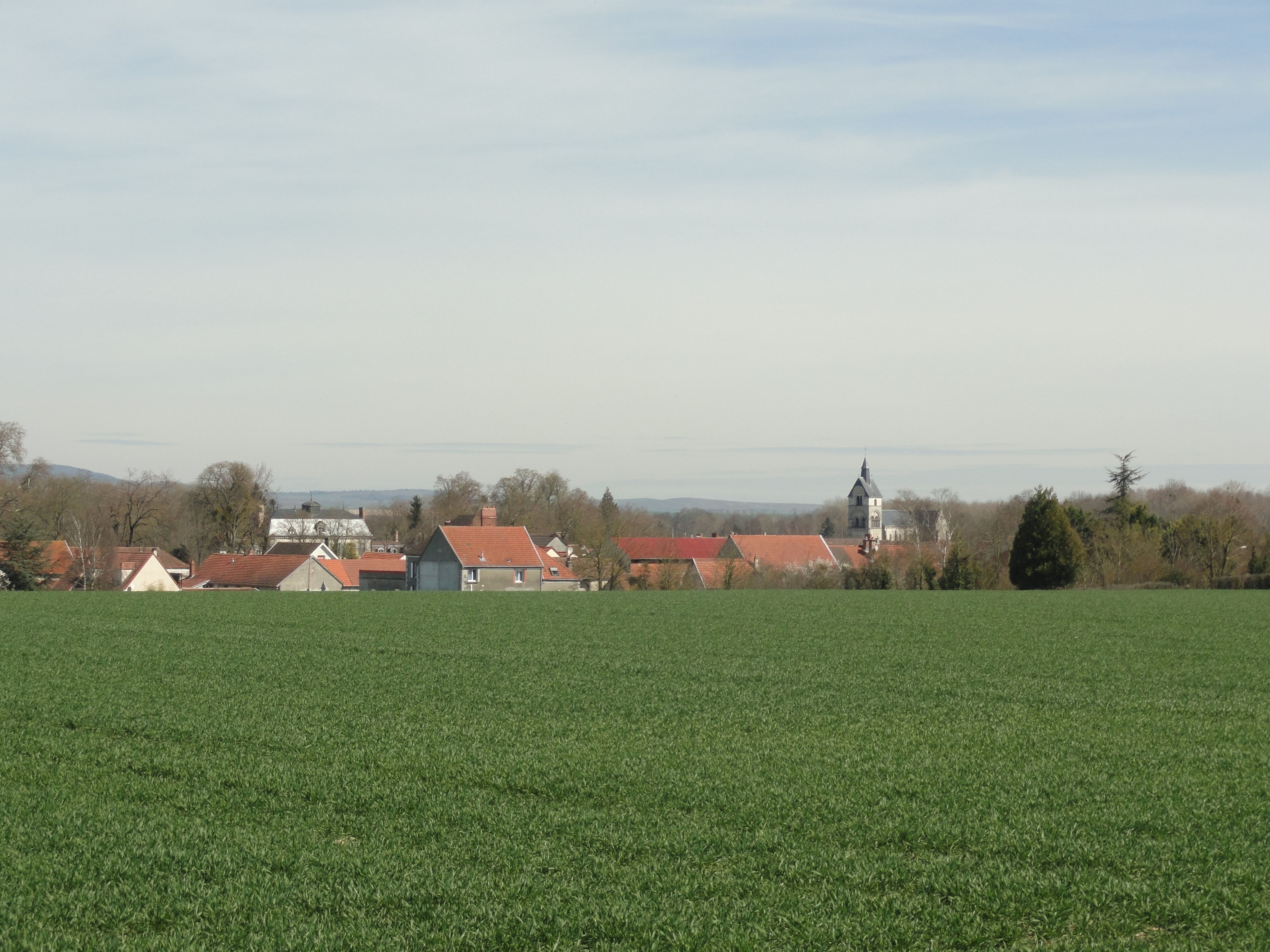 Vue du village d'Athis, depuis le sud-ouest.